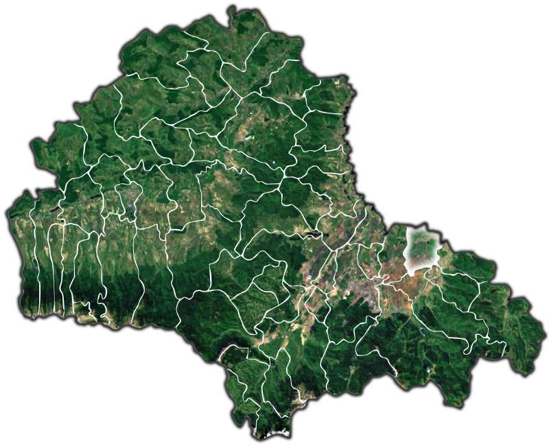 Prejmer jud Brasov